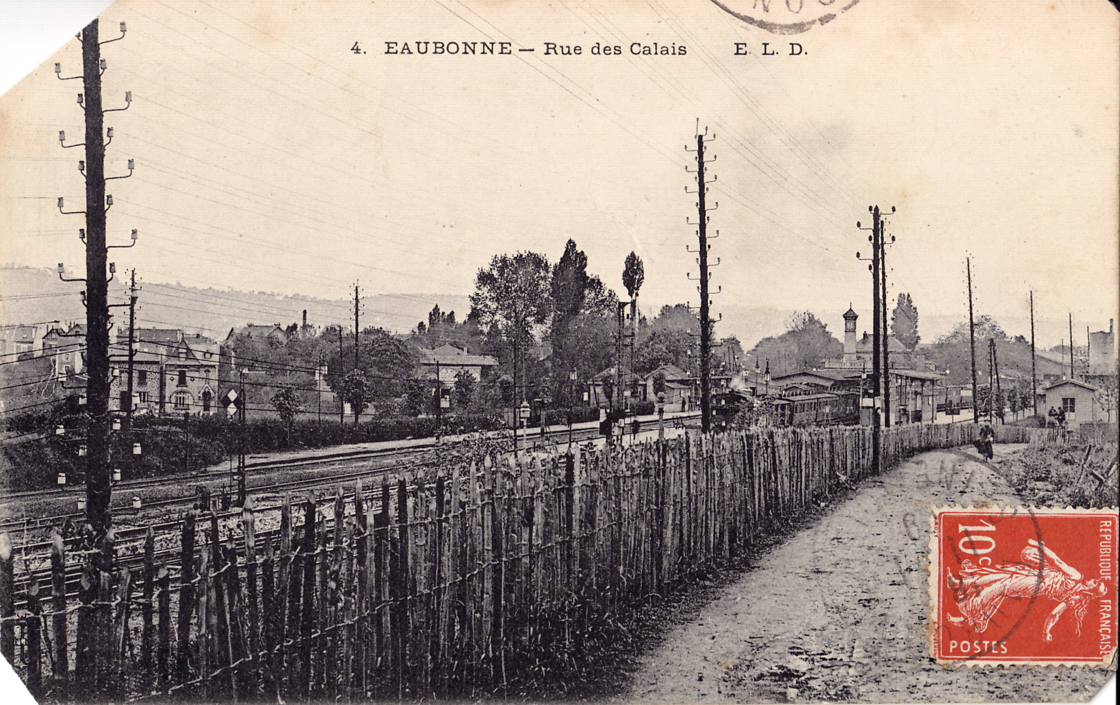 Carte postale ancienne éditée par ELD, n°4 : EAUBONNE - Rue des Callais